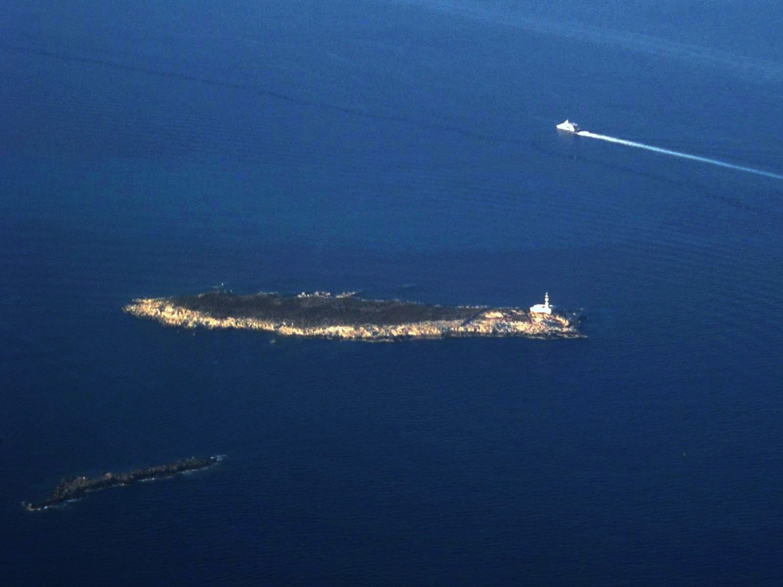 Illa dels Penjats, entre Eivissa i Formentera. Fotografia aèria. En primer pla, l'Illeta Negra Petita.